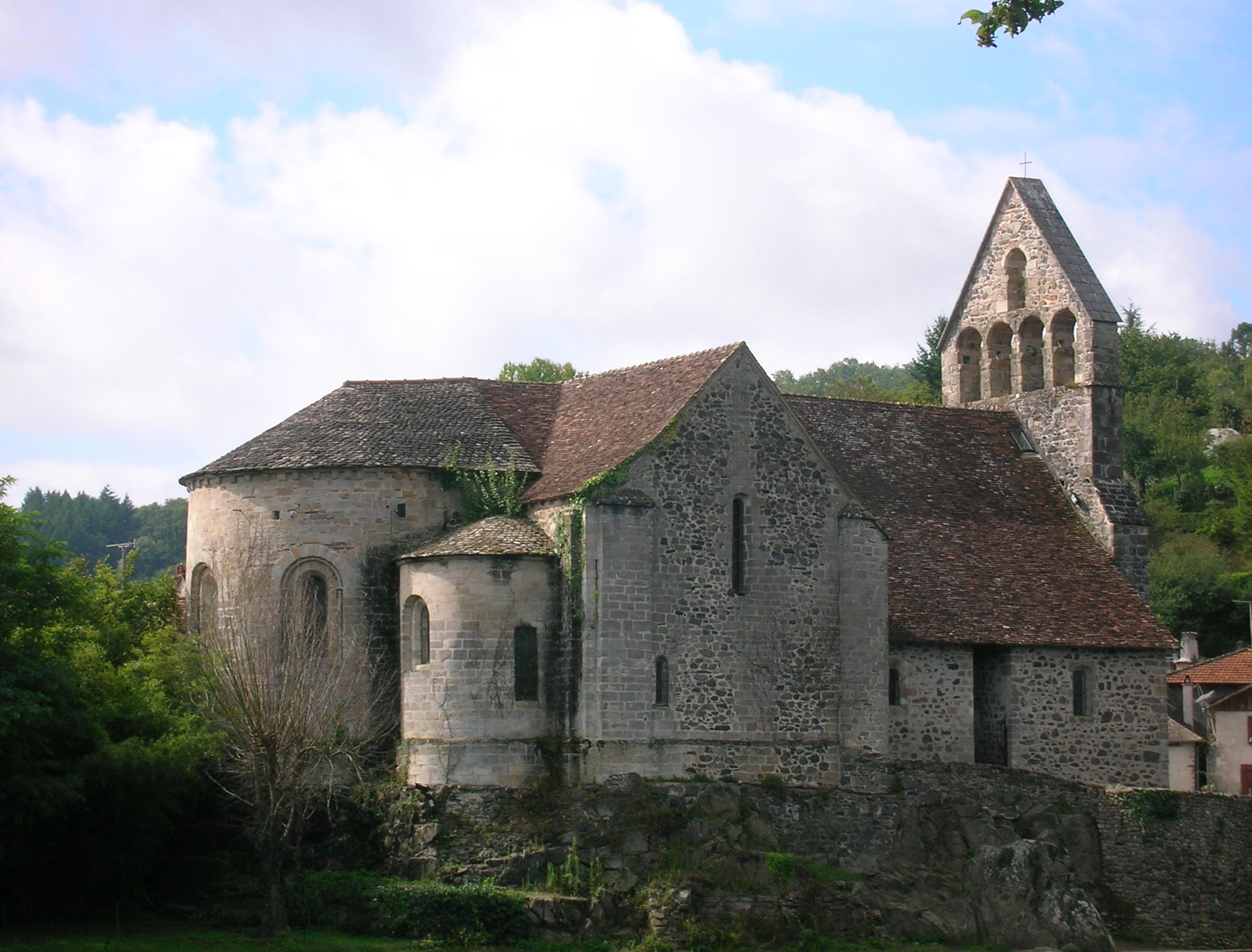 Chapelle des Pénitents, Beaulieu-sur-Dordogne